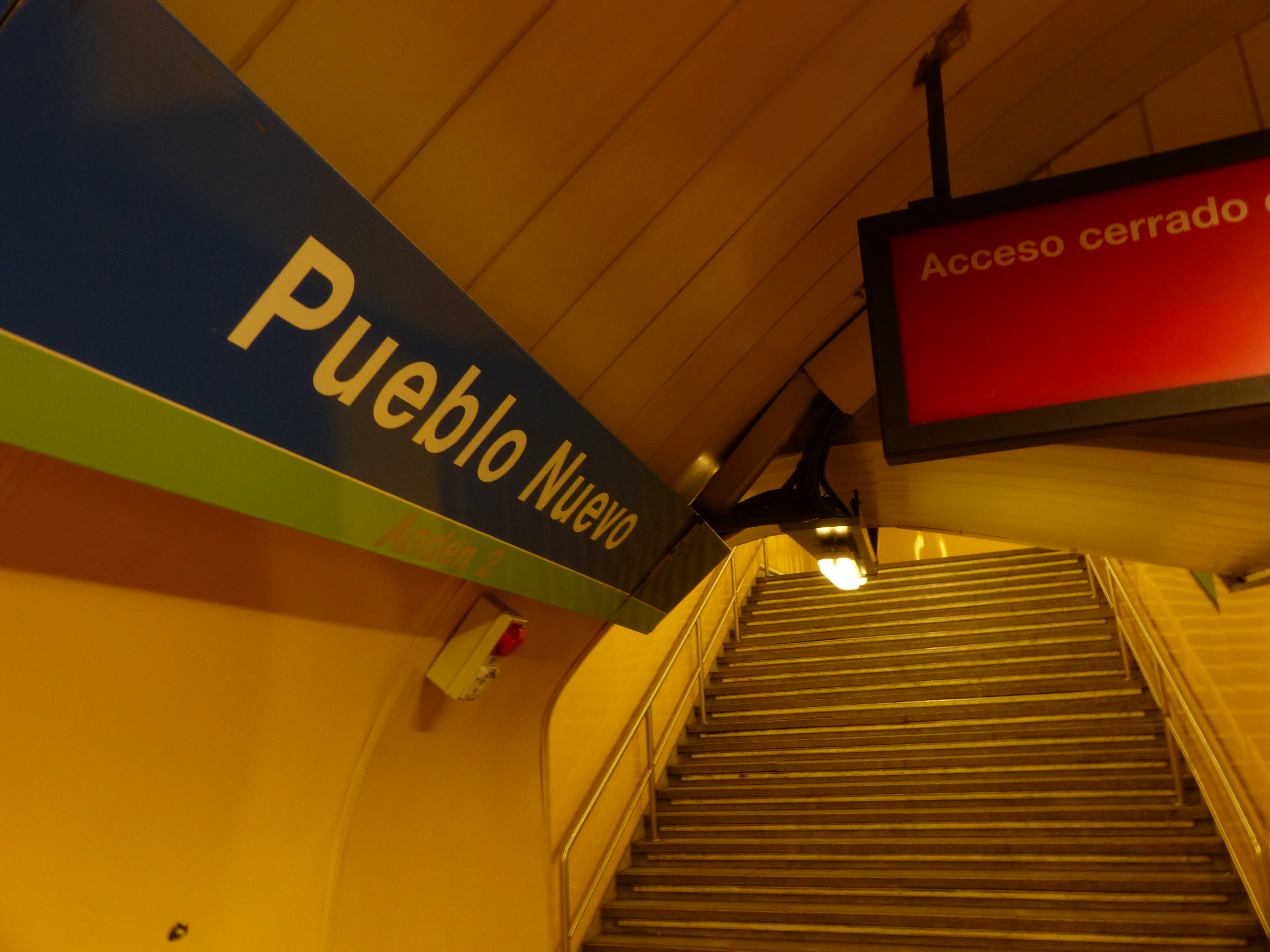 Estación de Pueblo Nuevo, escaleras.